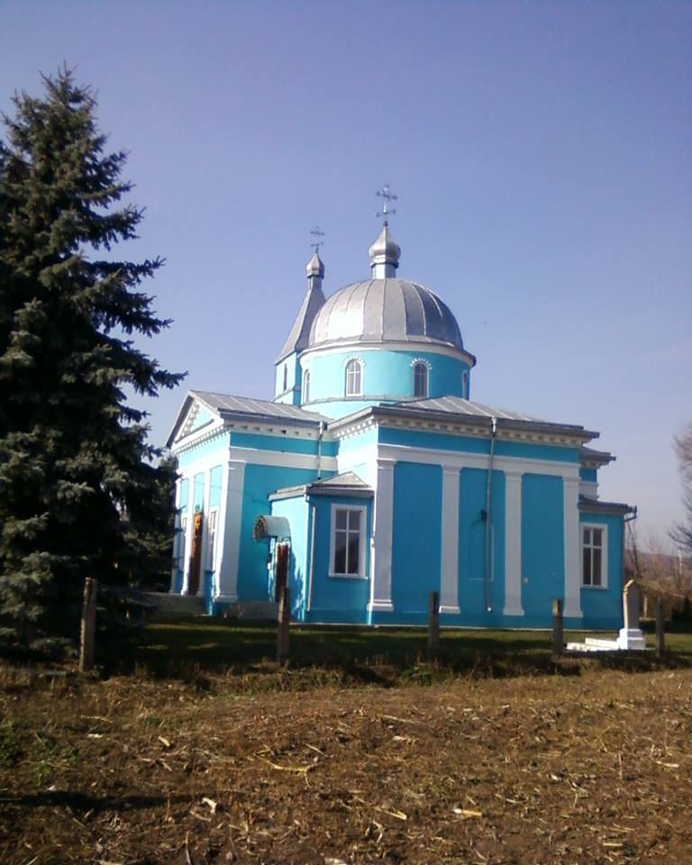 Храм Вознесіння Господнього, с. Новопетрівка, Мира вул., 1а